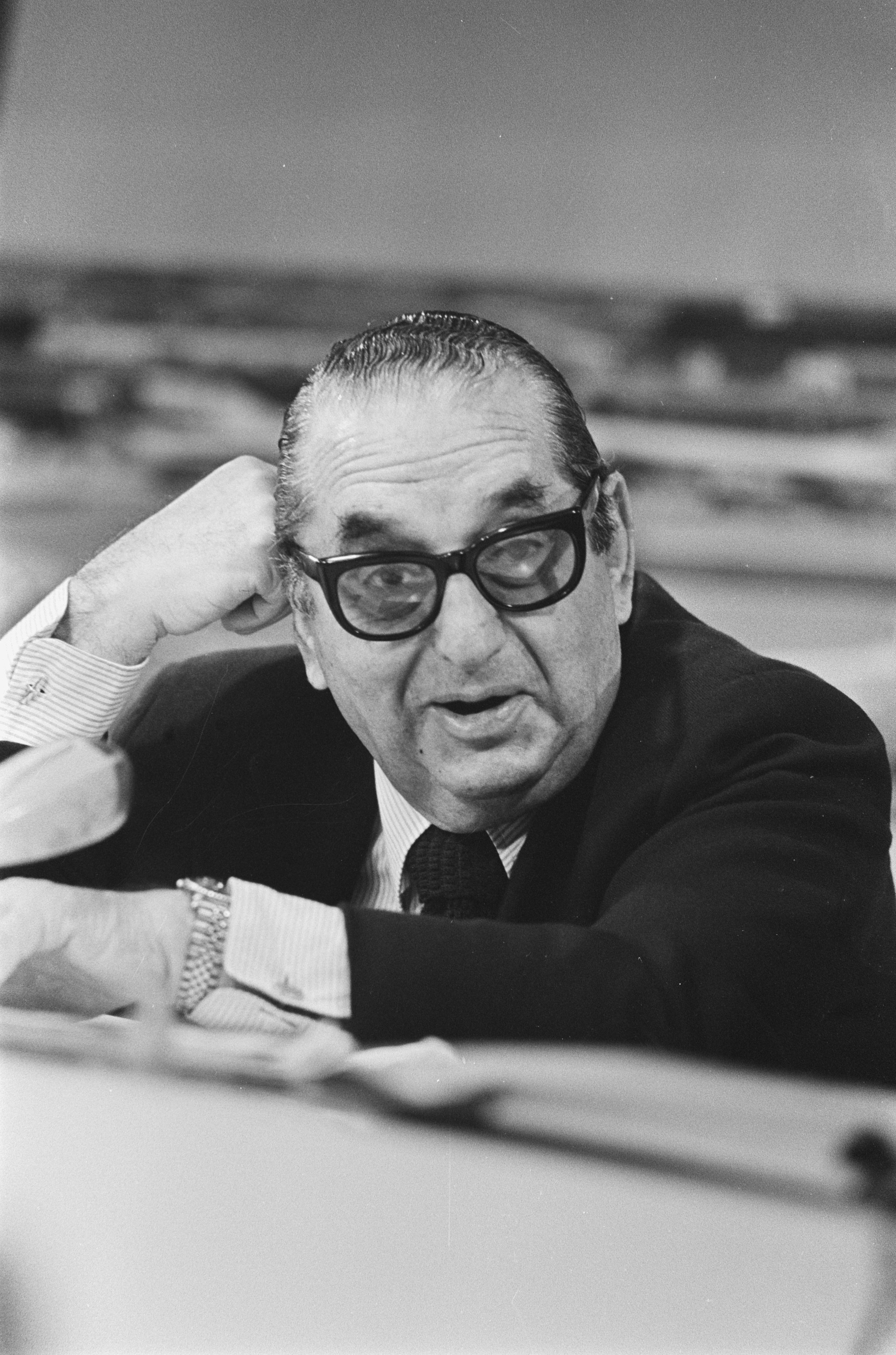 Collectie / Archief : Fotocollectie Anefo Reportage / Serie : [ onbekend ] Beschrijving : Producer "Een brug te ver" Joseph E. Levine geeft persconferentie op Schiphol; tijdens persconferentie Datum : 8 oktober 1976 Trefwoorden : persconferenties, producers Instellingsnaam : Schiphol Fotograaf : Bogaerts, Rob / Anefo Auteursrechthebbende : Nationaal Archief Materiaalsoort : Negatief (zwart/wit) Nummer archiefinventaris : bekijk toegang 2.24.01.05 Bestanddeelnummer : 928-8194